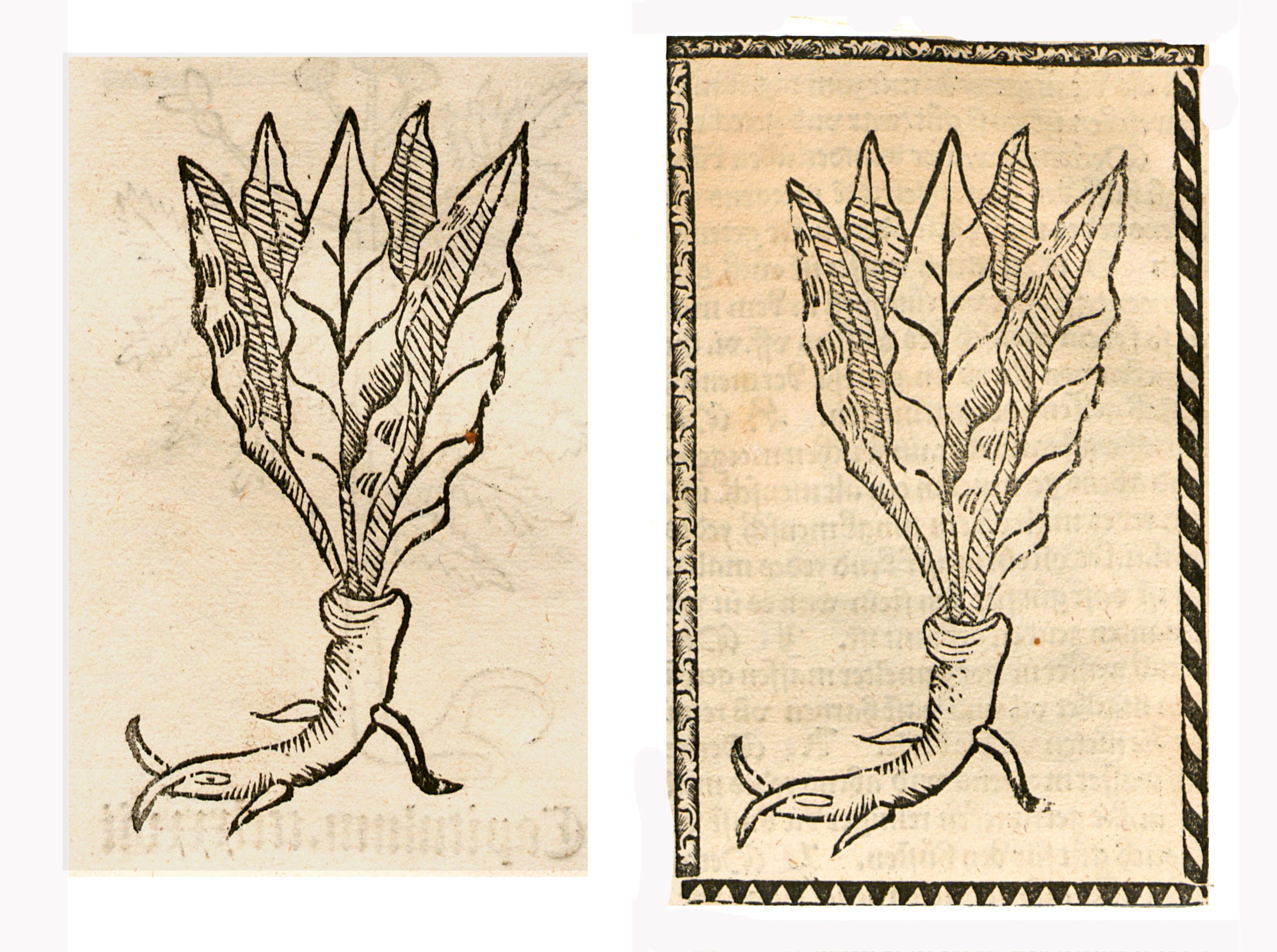 Abbildung von: Meerettich (Armoracia rusticana)